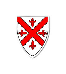 Coat of Arms Teignmouth